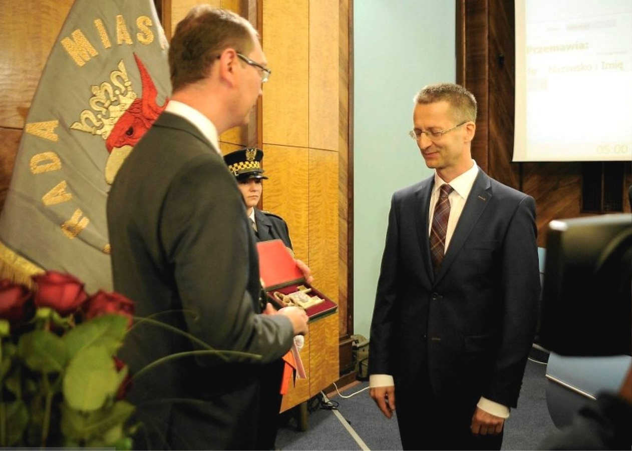 Leszek Sagan - tytuł honorowy Obywatel Szczecina